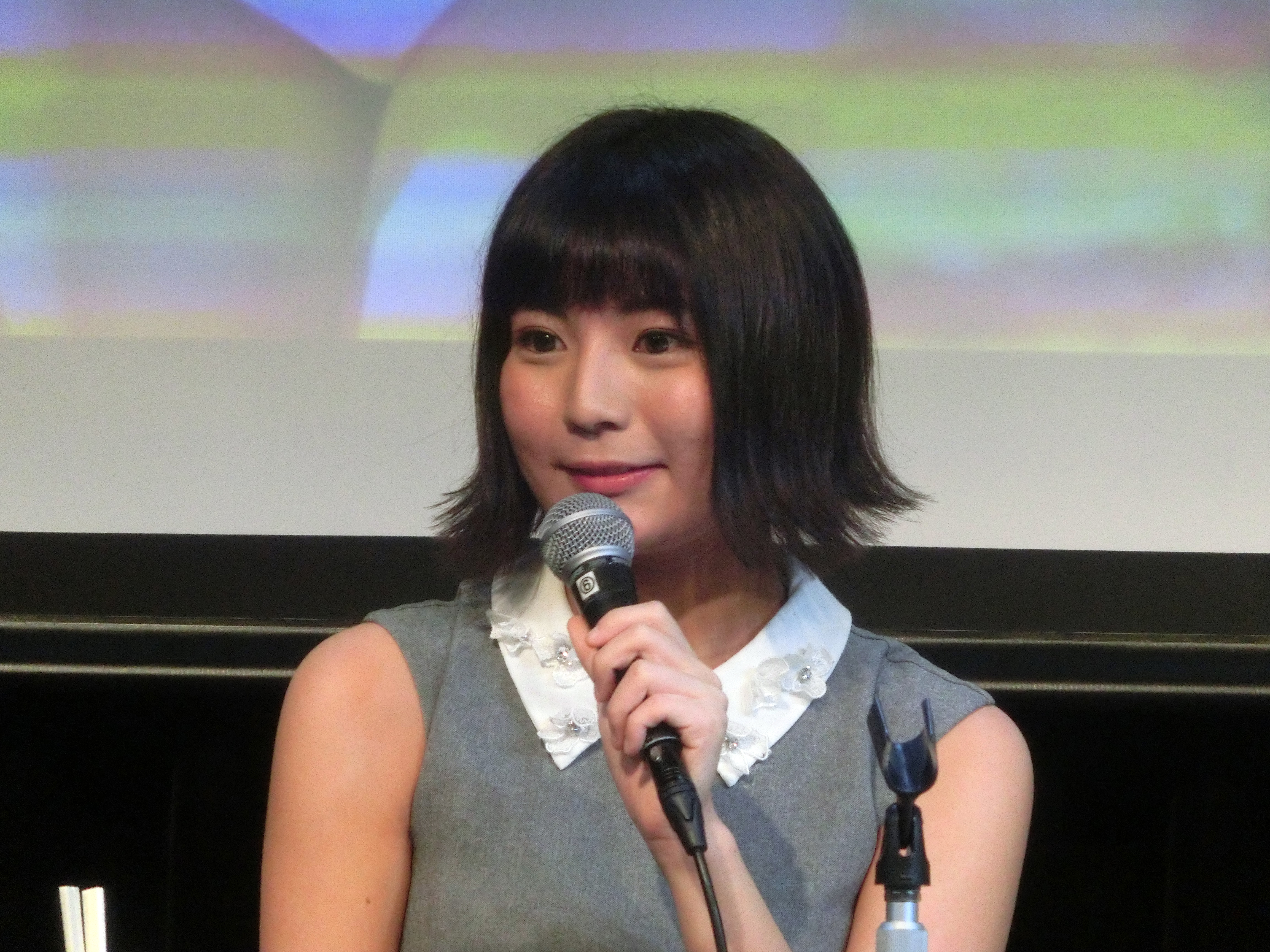 SHIBUYA LOFT 9